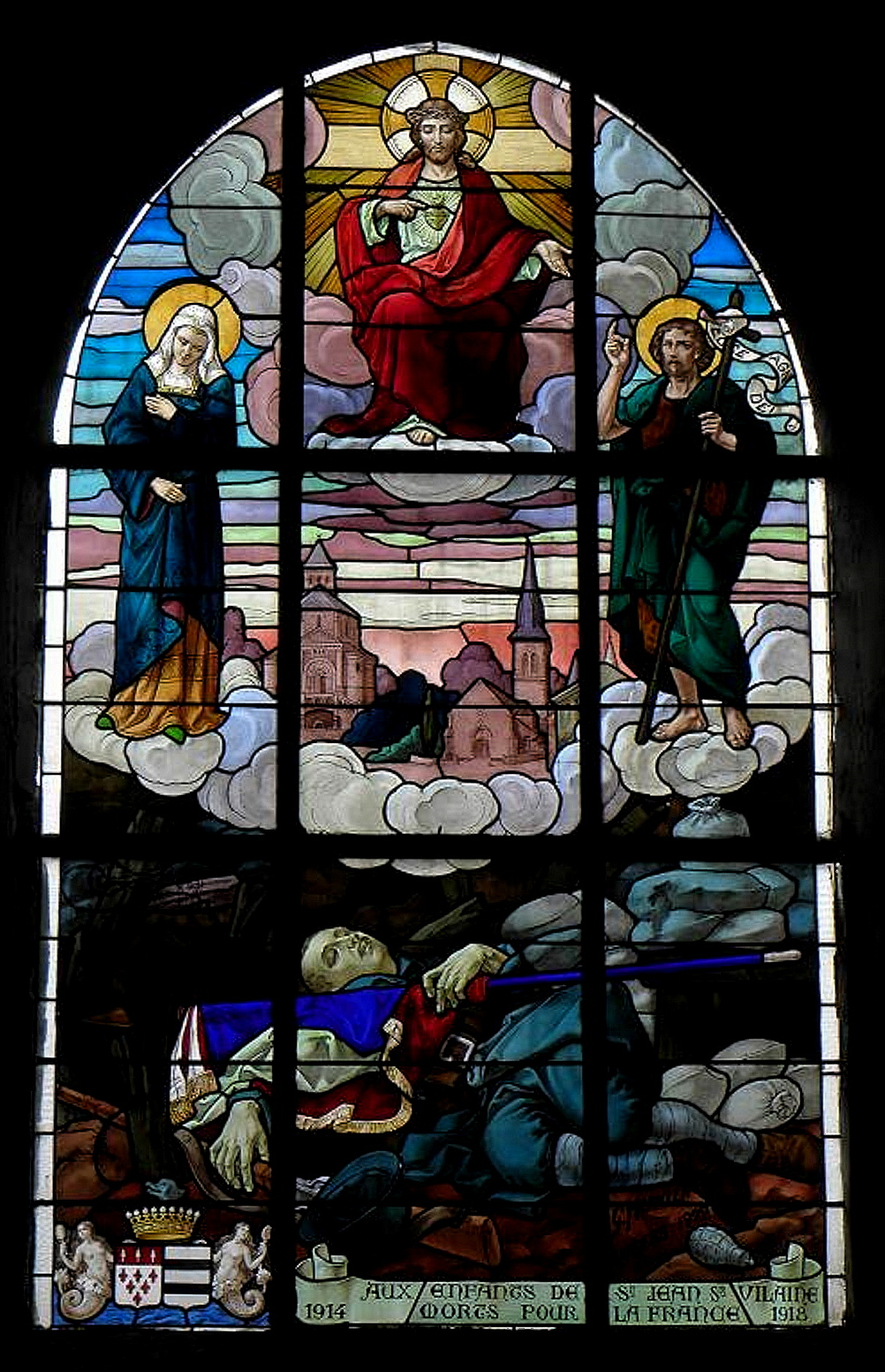 Vitrail de l'église Saint-Jean-Baptiste de Saint-Jean-sur-Vilaine (35). Vitrail patriotique de 1922. Dans la partie supérieure de la verrière le Sacré-Cœur, la Vierge Marie et saint Jean-Baptiste, patron de la paroisse, encadrent l'église de Saint-Jean sur Vilaine et la chapelle de La Peinière en Saint-Didier, haut lieu de pélerinage ; dans la partie basse un soldat mort enroulé dans le drapeau repose au fond d'une tranchée du front ; en bas à gauche les armoiries de la famille de La Chevasnerie, maire de l'époque se trouvent en bas à gauche. Le vitrail porte l'inscription "Aux enfants de Saint-Jean-sur-Vilaine morts pour la France 1914-1918" ; un soldat de 14-18 décédé et aussi représenté. Ce vitrail a été réalisé par Georges Merklen (décédé en 1925), maître-verrier à Angers.